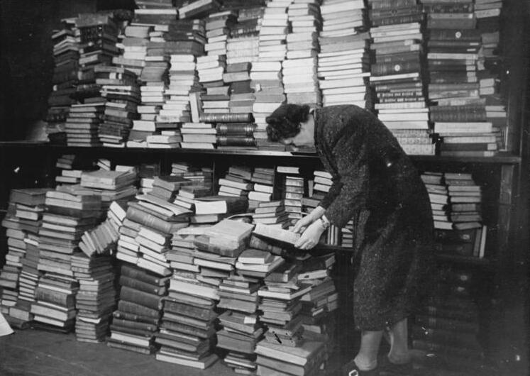 Berlin, Staatsbibliothek, Magazin Weitere Abzüge im Vorrat Öffentlich-Wissenschaftliche Bibliothek im Wiederaufbau. (siehe Begleittext) UBz: Riesenstapel von Büchern, die im Keller verwahrt oder verlagert waren, sind heute wieder einzusortieren. Aufn.: Illus Kemlein 7 4619-49 Nov.49 Leihweise Illus Berlin W